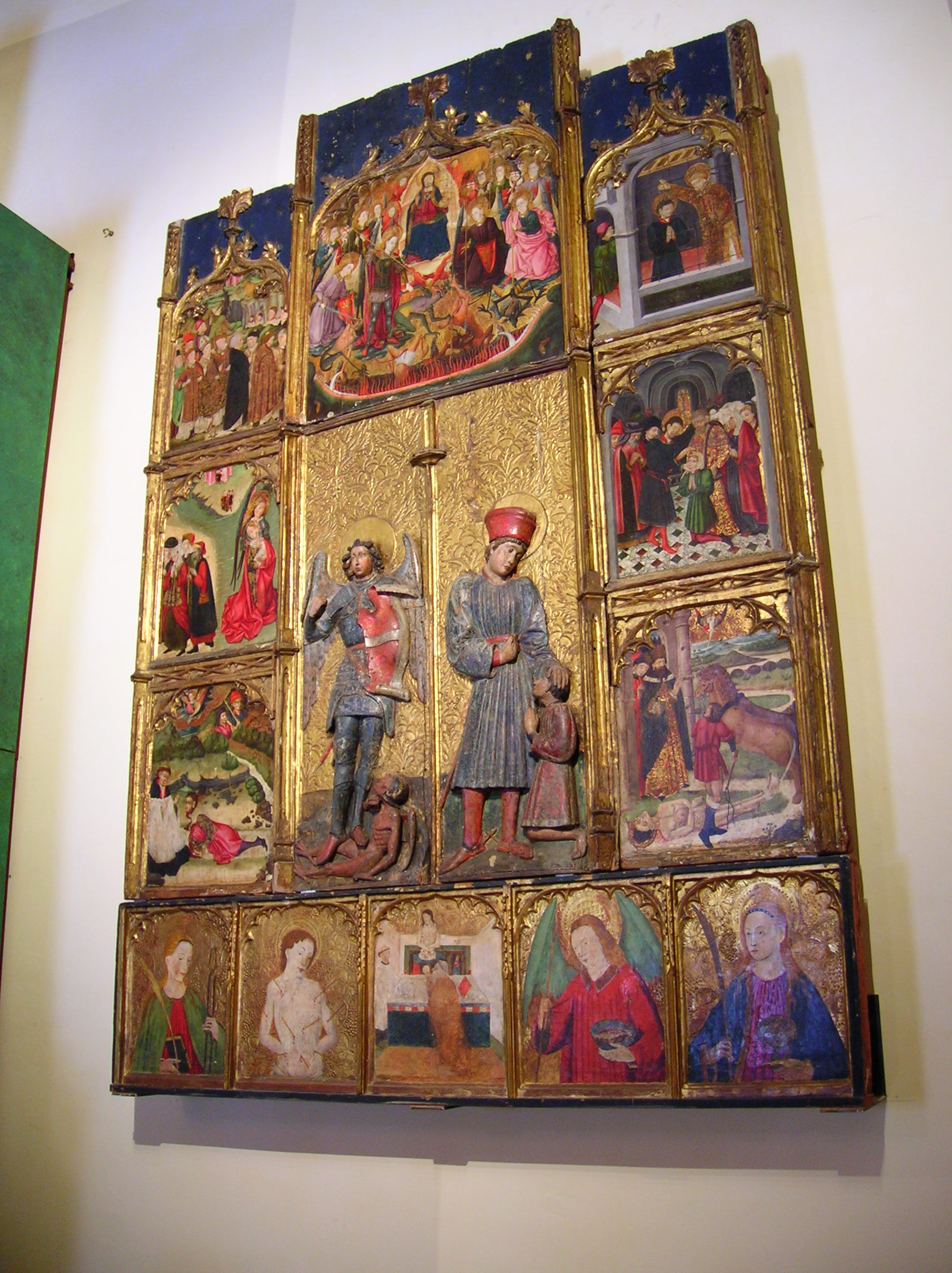 Le Retable Gothique de Saint-Michel et Saint-Hippolyte (XVe siècle), oeuvre d'Arnaud Gassies, situé dans l'église de Palau-del-Vidre.